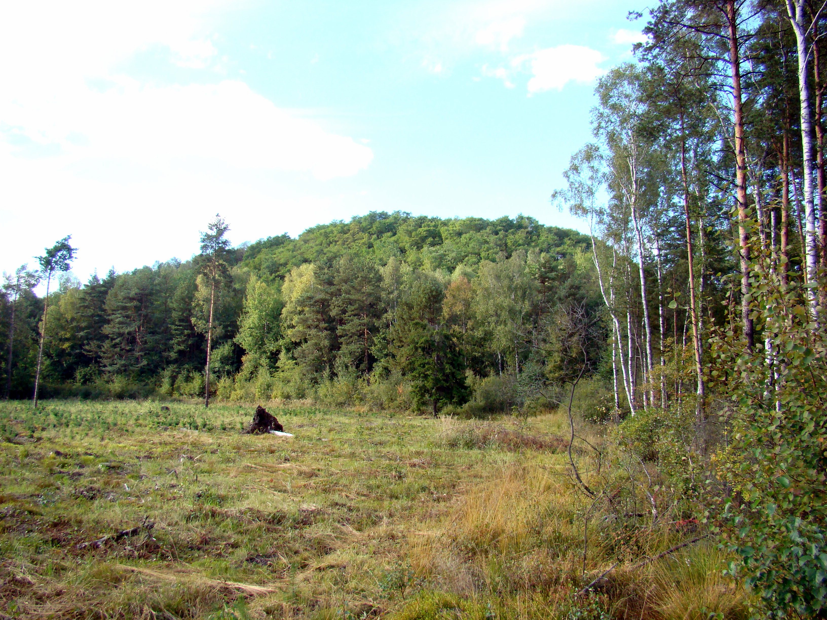 Hałda nieczynnej kopalni rud żelaza "Dębowiec", 297 m n.p.m., Dębowiec, gmina Poczesna